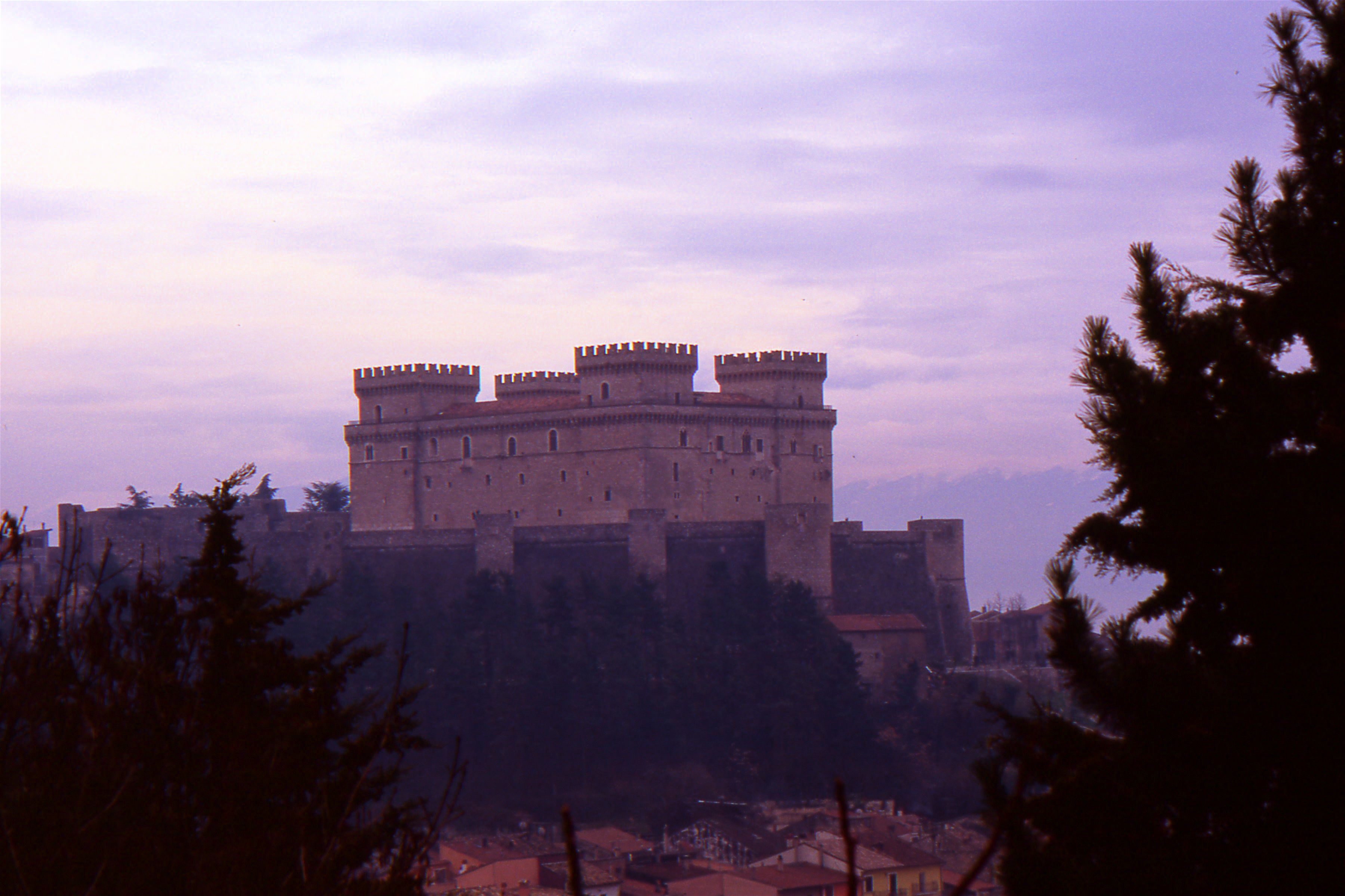 Vista del Castello Piccolomini di Celano dalla via di L'Aquila